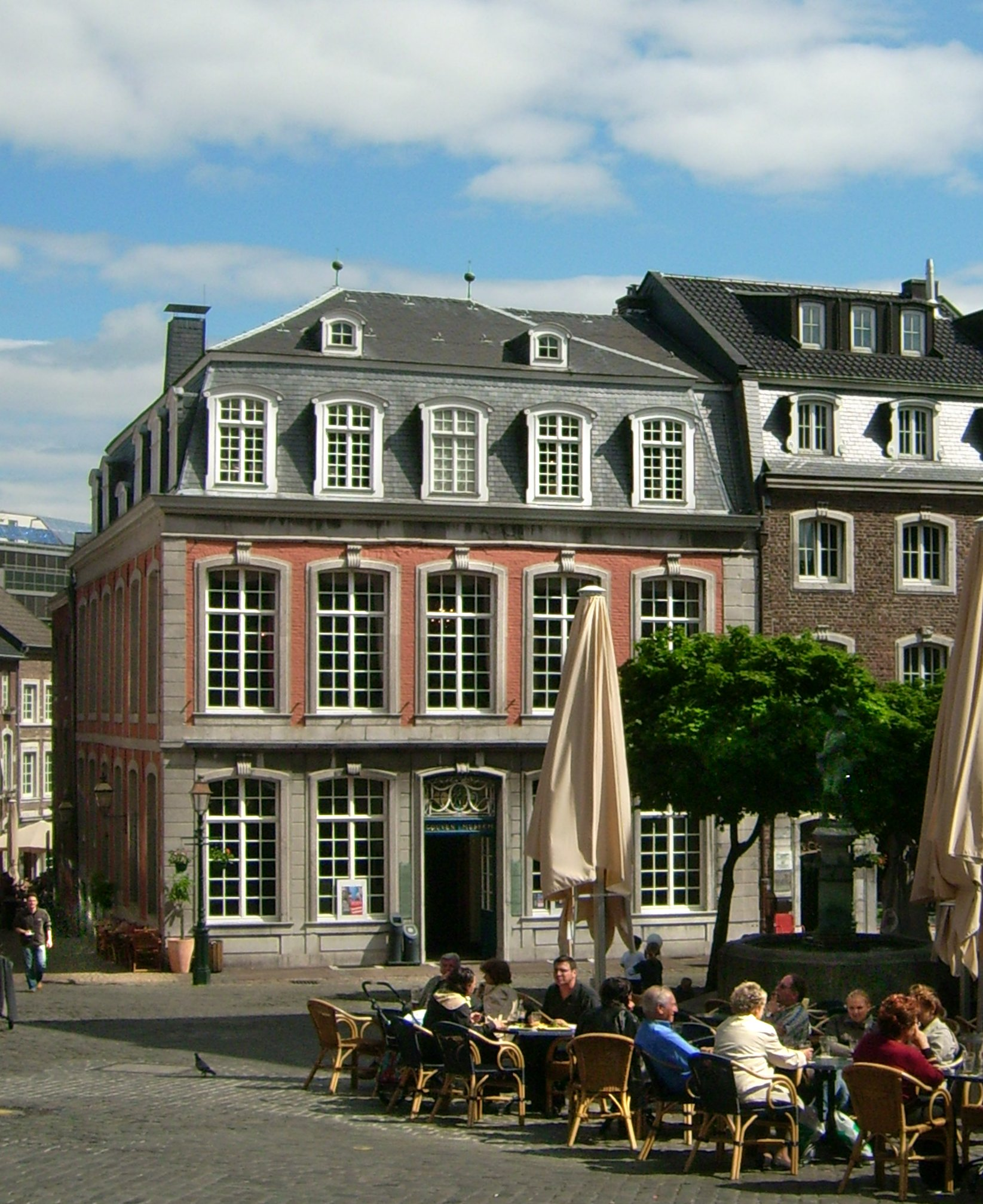 Blick auf das Couvenmuseum in Aachen